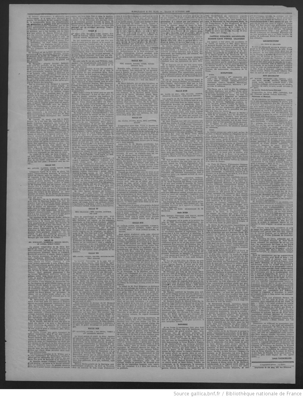 Titre : Gil Blas / dir. A. Dumont Éditeur : [s.n.] (Paris) Date d'édition : 1905-10-17 Contributeur : Dumont, Auguste (publiciste). Directeur de publication Contributeur : Gugenheim, Eugène (1857-1921). Directeur de publication Contributeur : Mortier, Pierre (1882-1946). Directeur de publication Type : texte Type : publication en série imprimée Langue : Français Langue : language.label.français Format : application/pdf Format : Nombre total de vues : 53031 Description : 1905/10/17 (A27,N9500). Droits : domaine public Identifiant : ark:/12148/bpt6k7522165g Source : Bibliothèque nationale de France, département Droit, économie, politique, JOD-209 Relation : Relation : Provenance : Bibliothèque nationale de France Date de mise en ligne : 27/08/2012